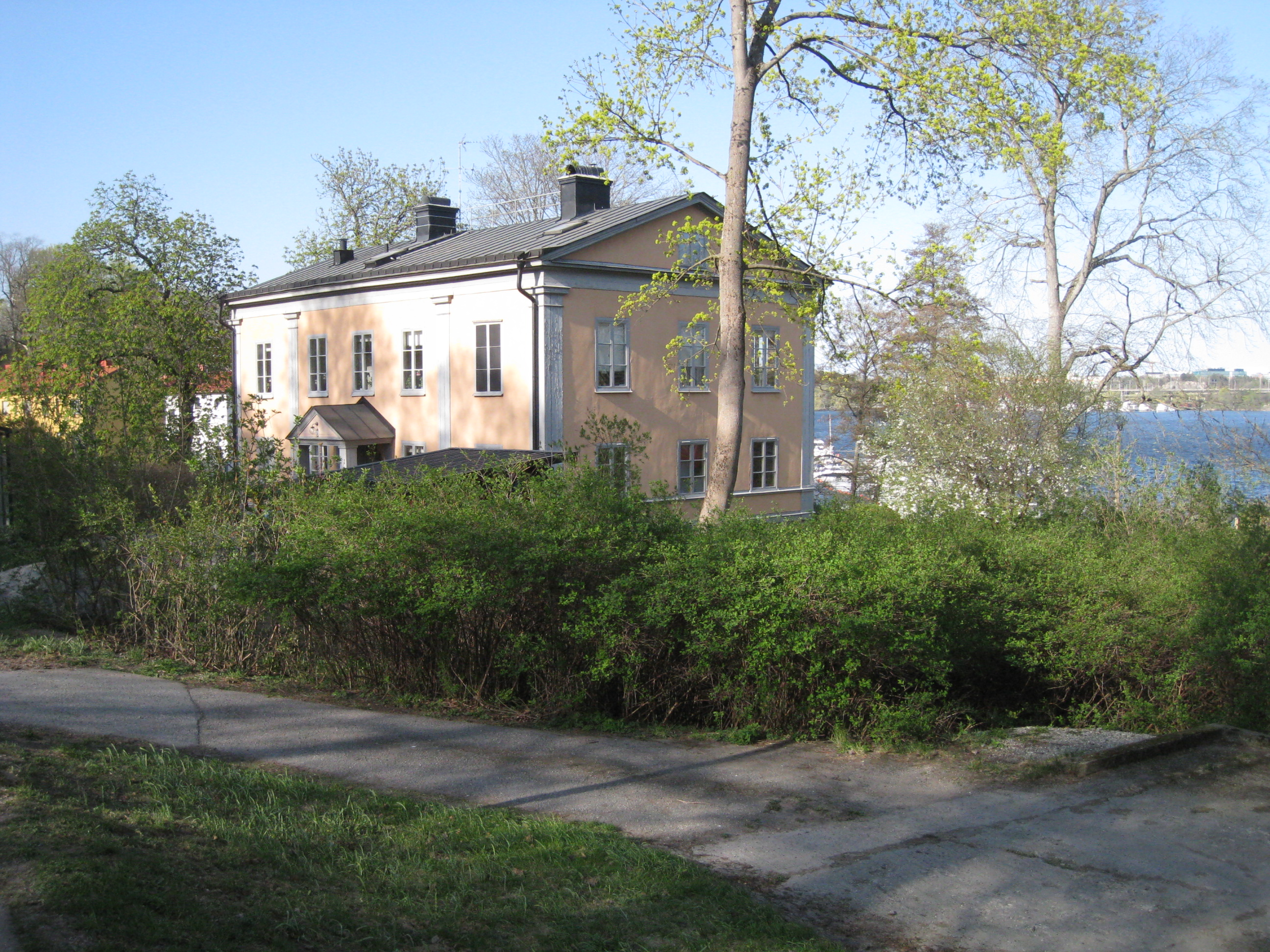 Tranebergs gård, Bromma, Stockholm.